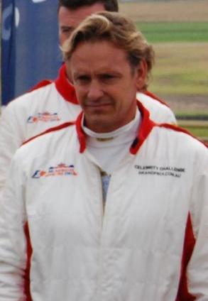 Guy Leech